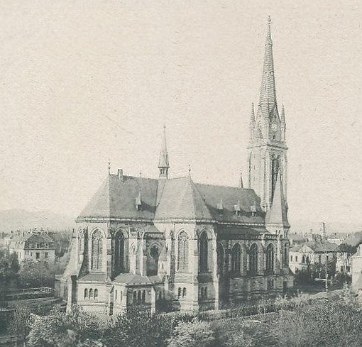 Zittau, katholische Pfarrkirche Mariä Himmelfahrt, um 1910